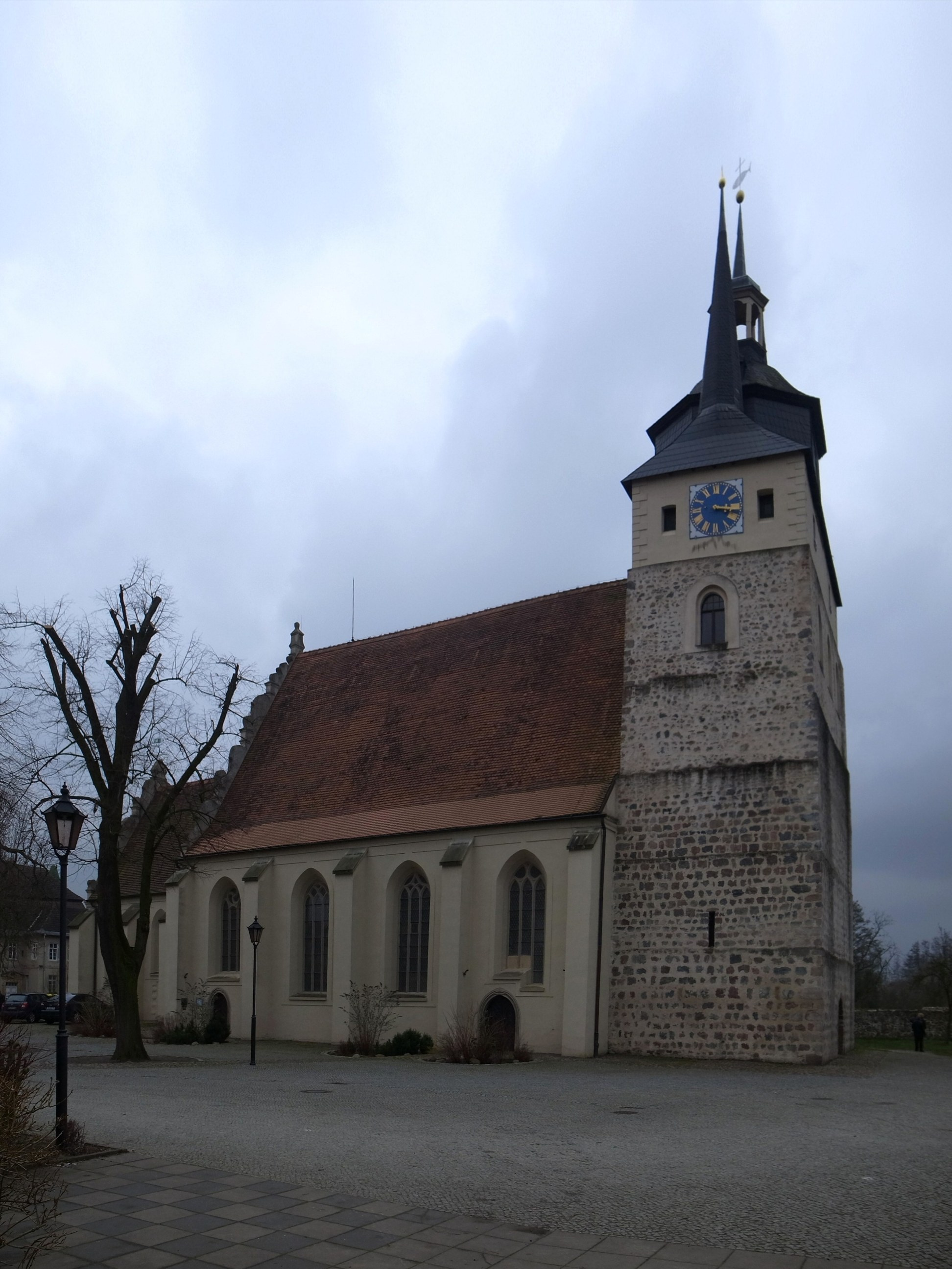 Loburg (Sachsen-Anhalt), St.Laurentius-Kirche